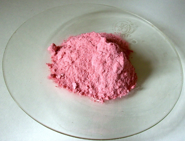 Co(CH3COO)2